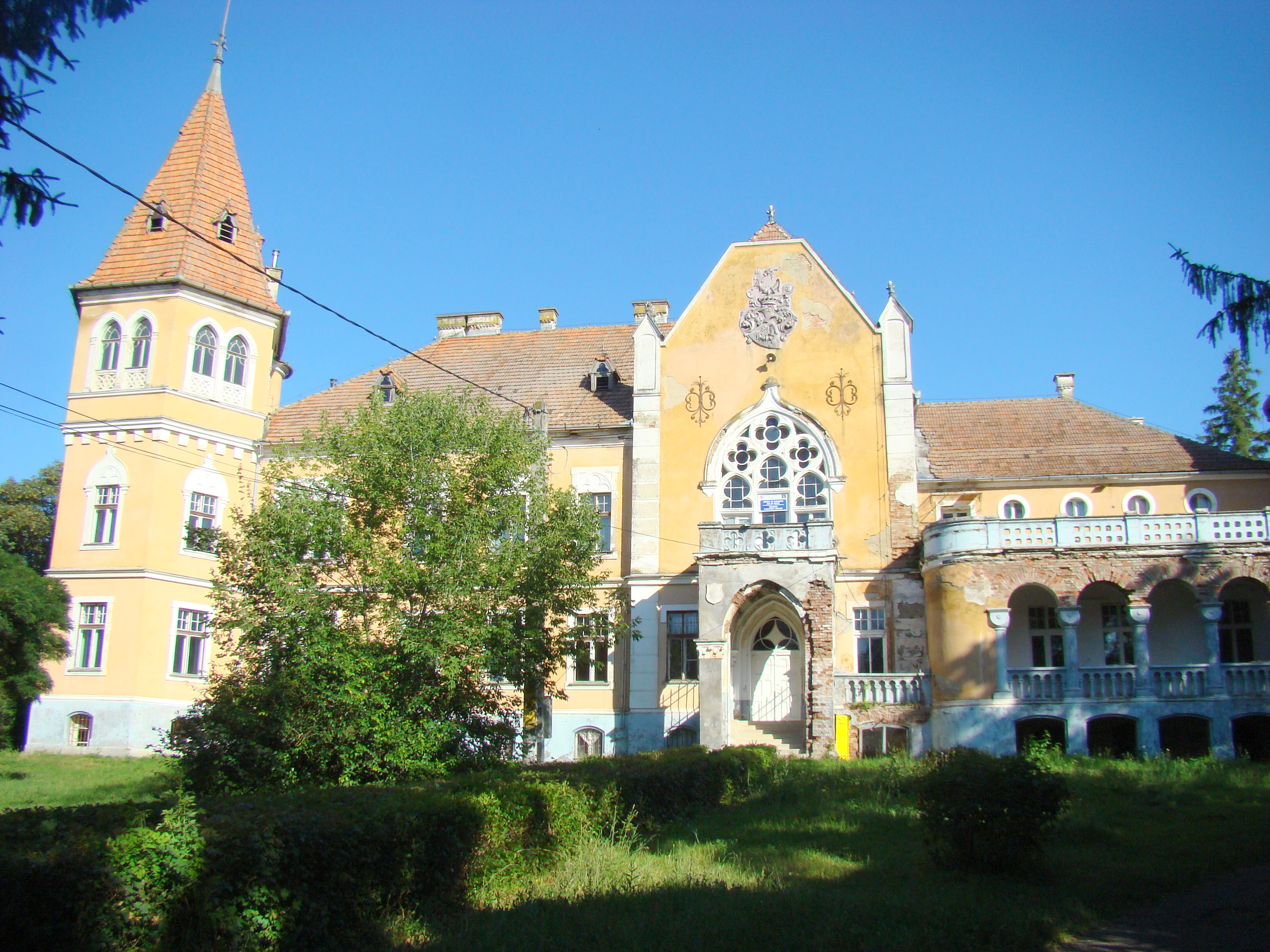 Castelul Ugron, sat Zau de Câmpie; comuna Zau de Câmpie 01